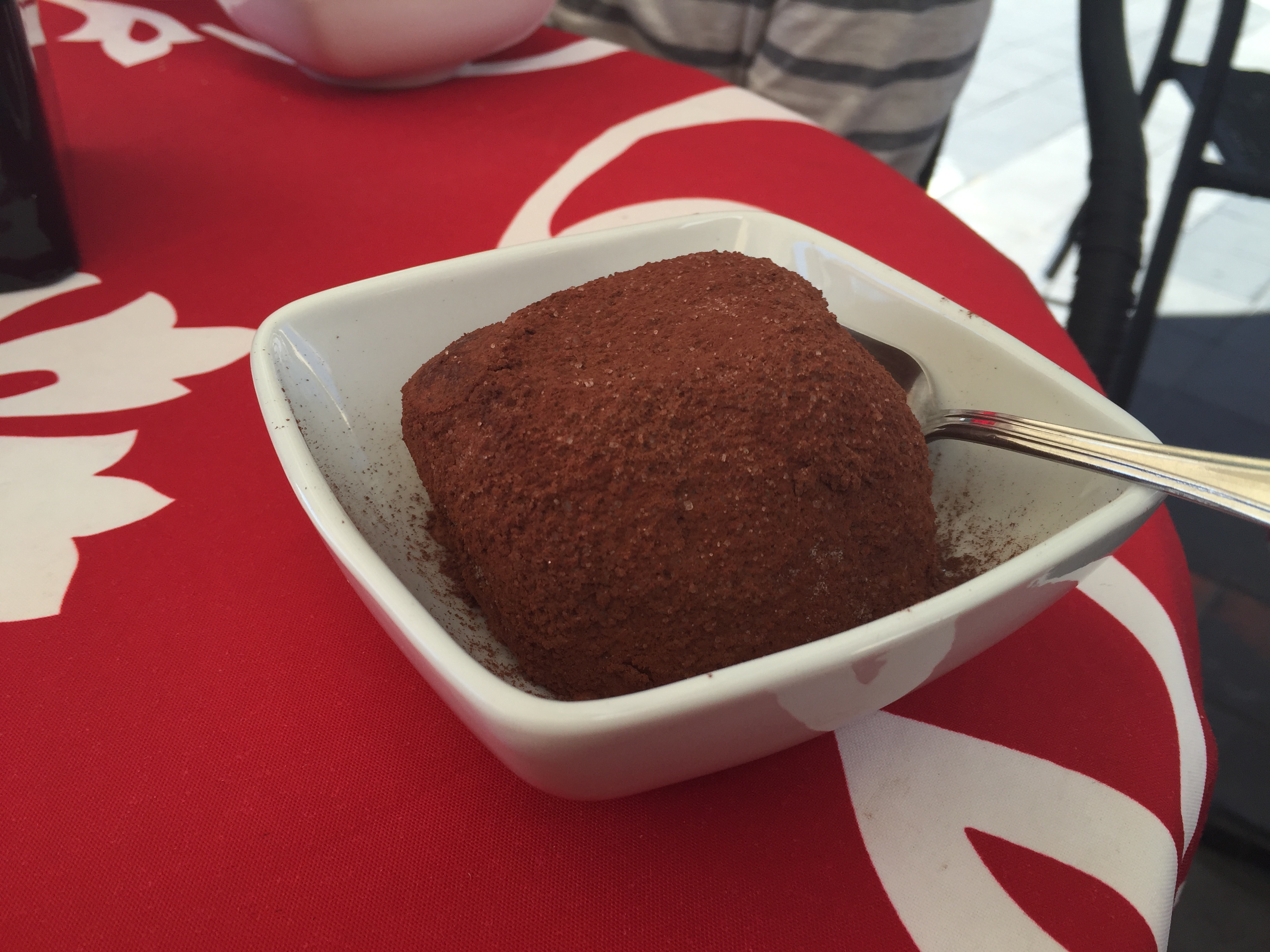 Ein Tartofu Eis nach original Rezeptur in einem Eiskaffee in Pizzo